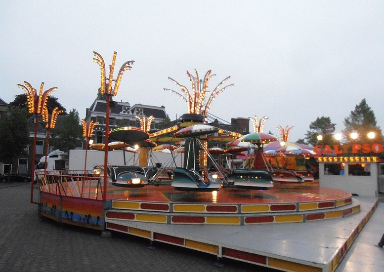 De Calyspo van de Familie Kroon op de Meikermis in Groningen 2013